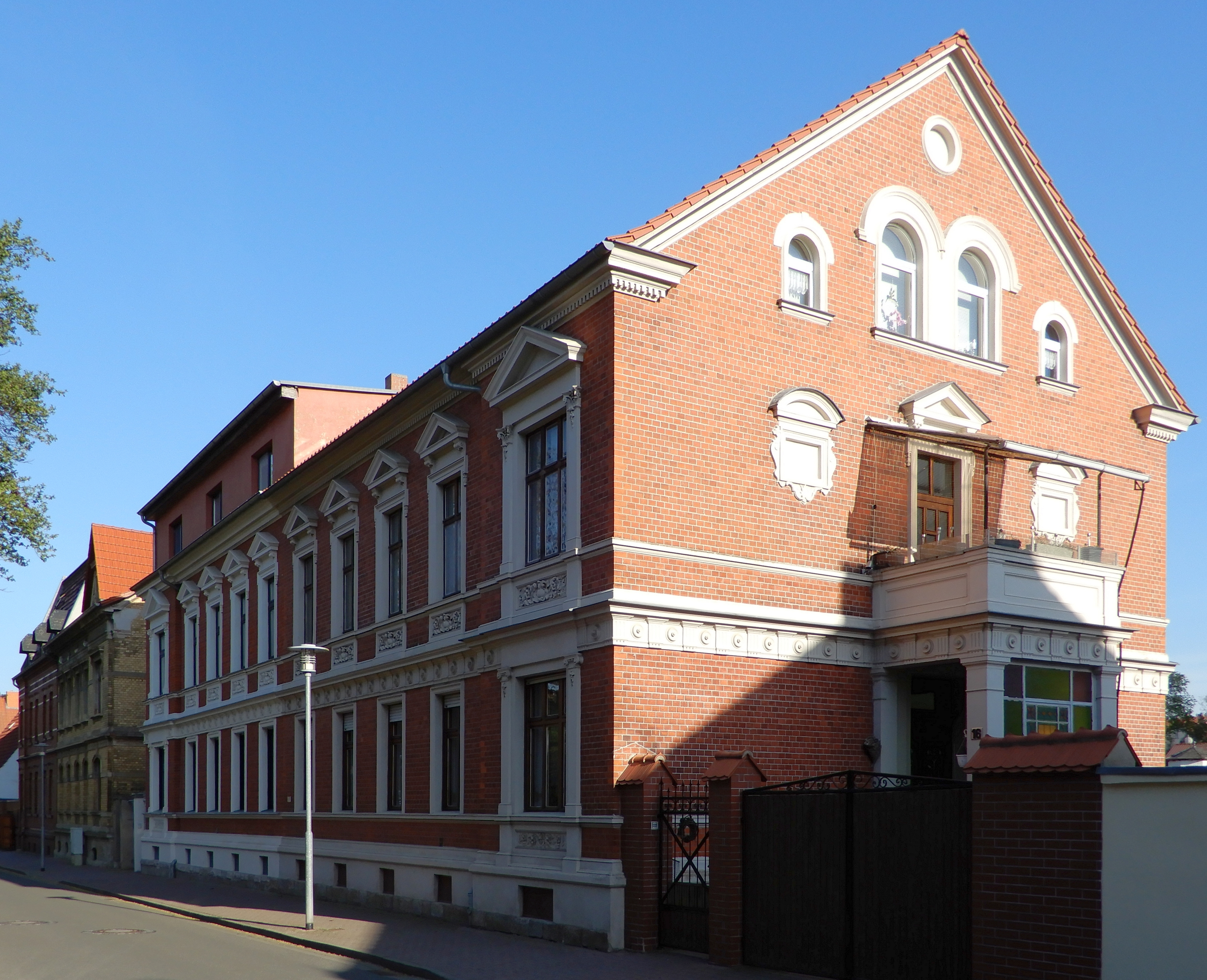 Gebäude Vogelgesang 14-16 in Aschersleben